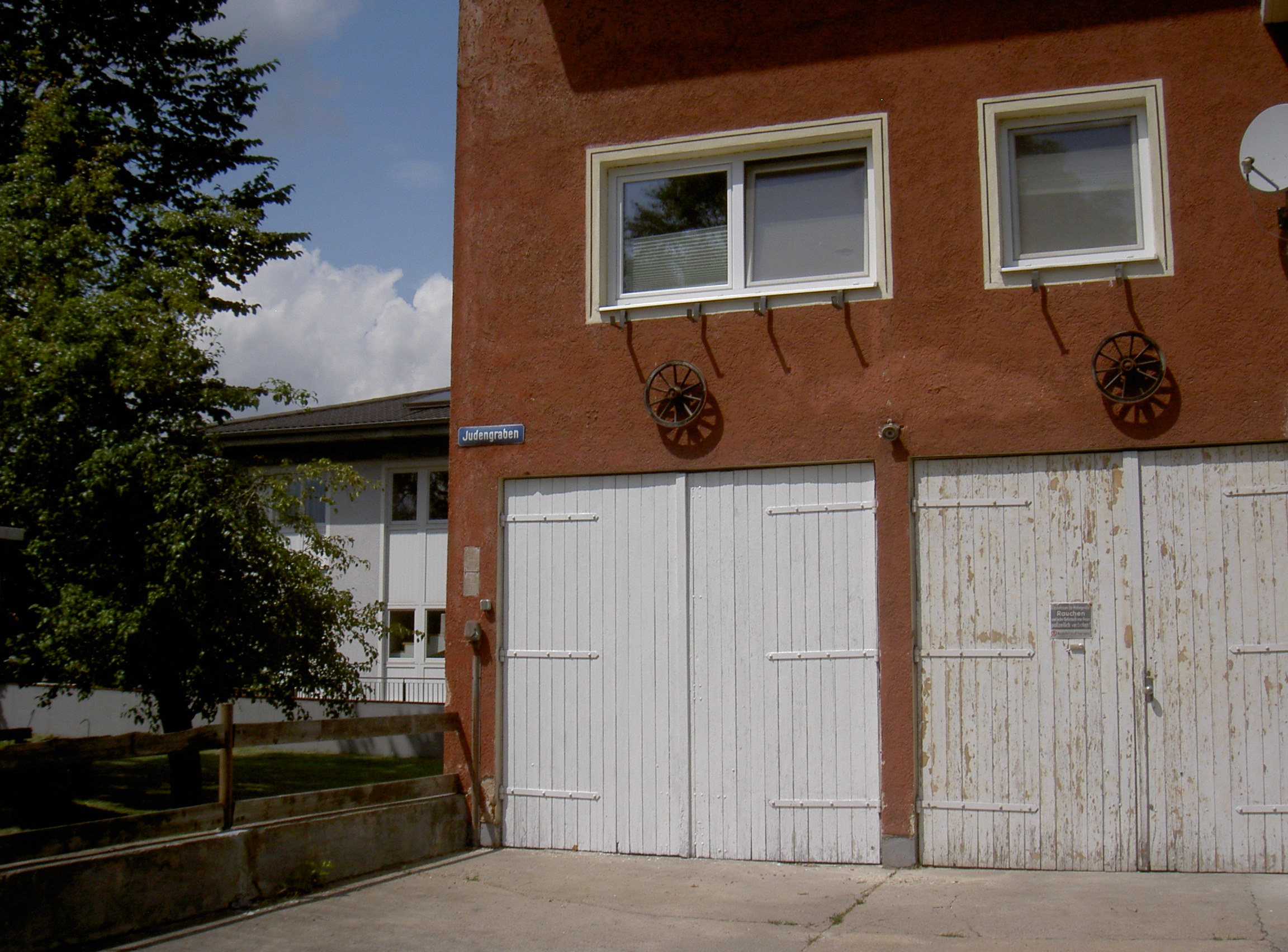 Gelände des ehemaligen Jüdischen Friedhofs (Neustadt an der Waldnaab), Judengraben